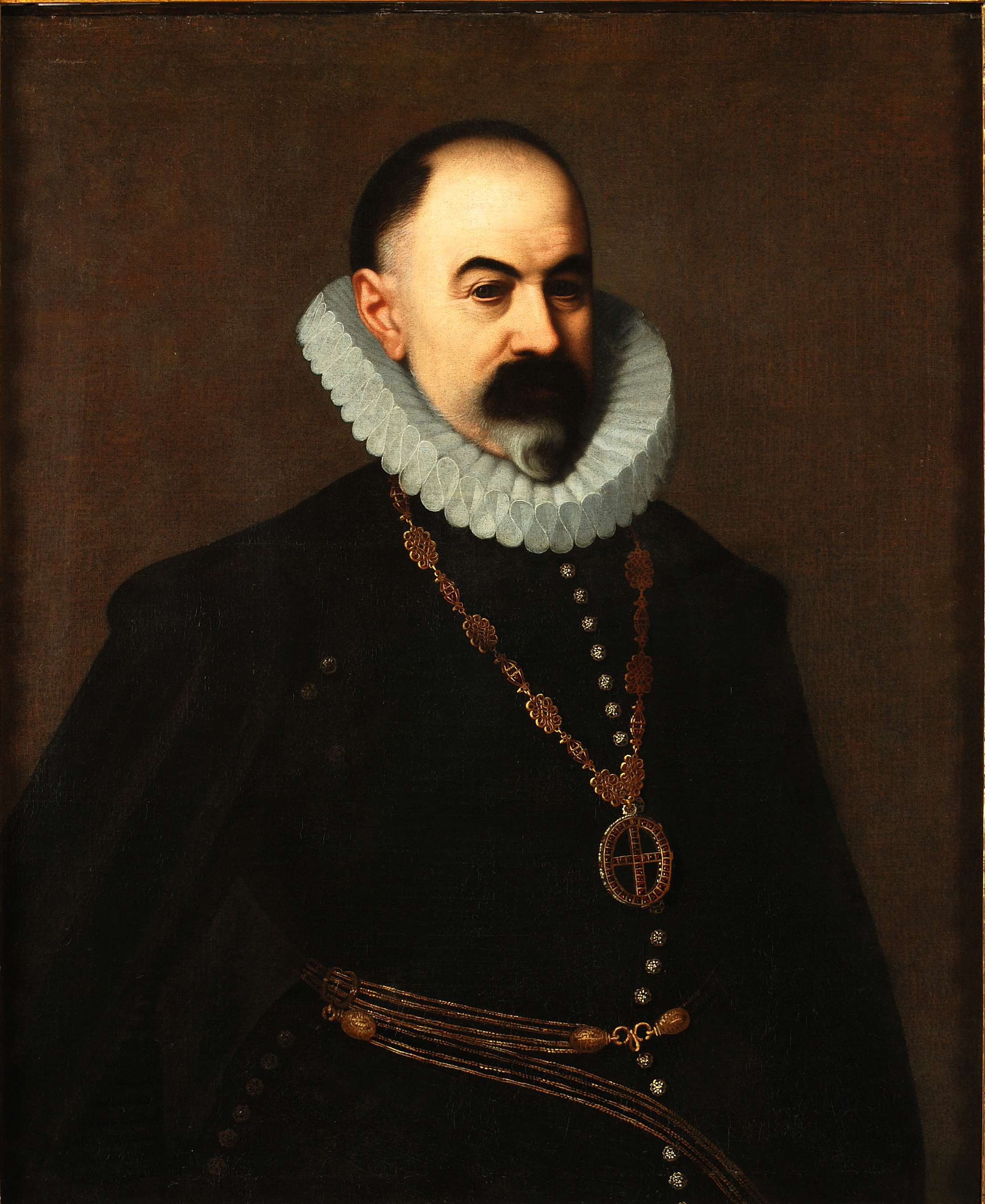 Retrato del conde de Villalonga, Pedro Franqueza (Igualada 1547 - León 1614), secretario del Consejo de Estado.